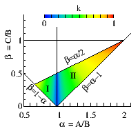 Elliptischer Modul bei der zweiten Steklowschen Lösung der Kreiselgleichungen